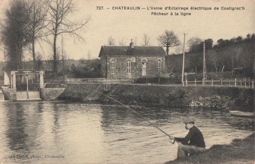 L'ancienne usine électrique.